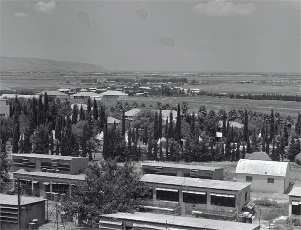 אושה - מבט מרמת יוחנן, מראה כללי